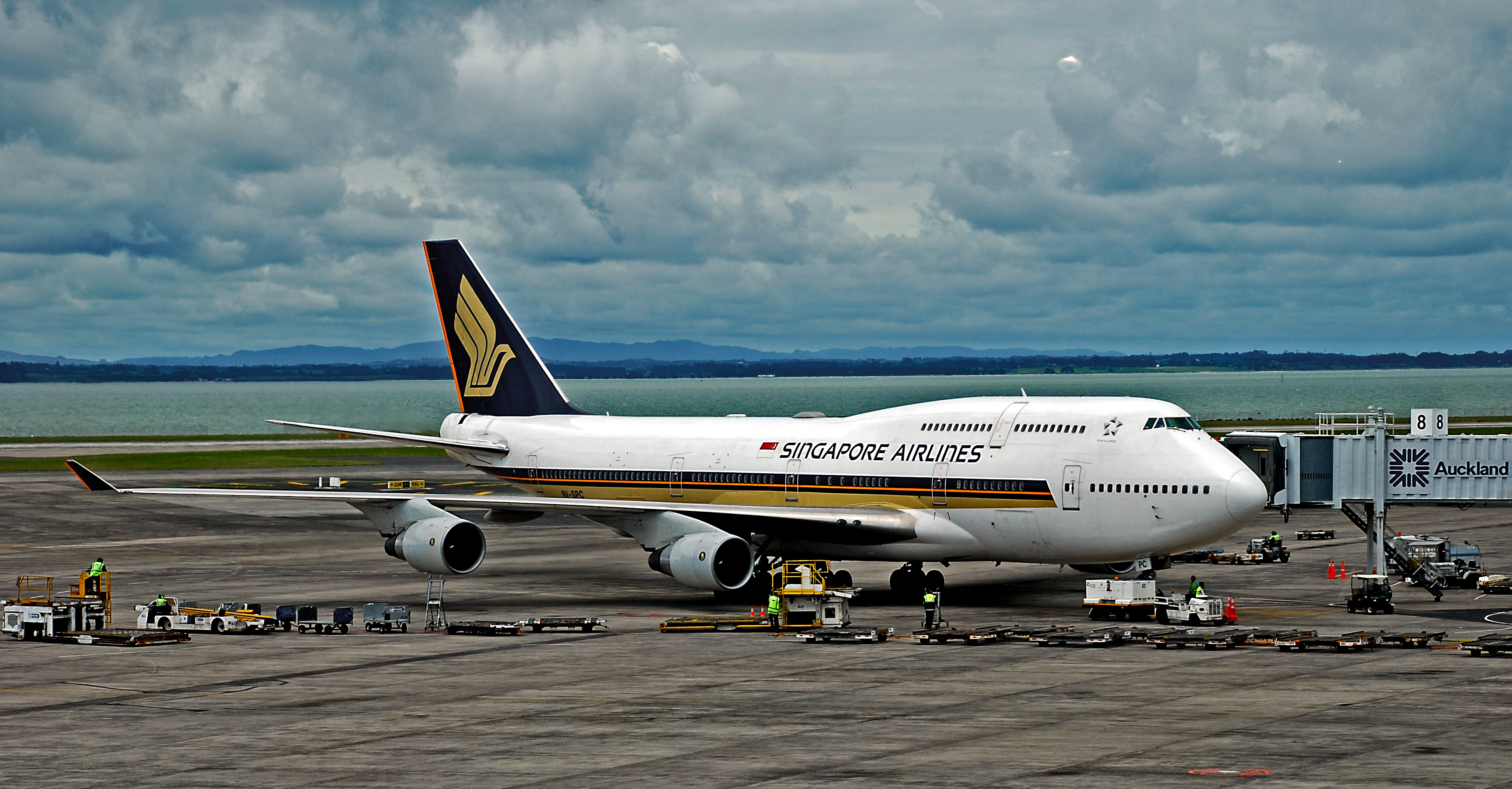 Singapore Airlines Boeing 747-412